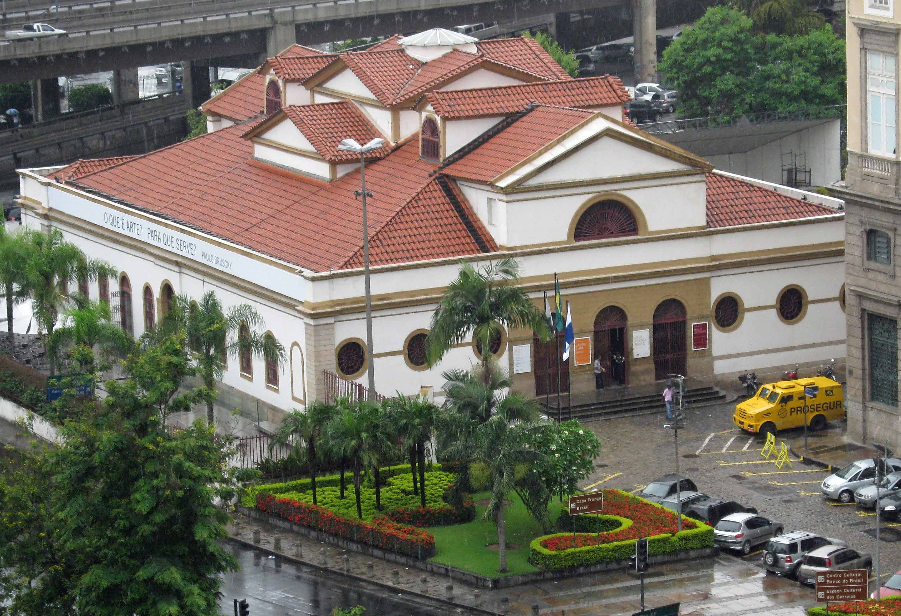 Casa França-Brasil - Rua Visconde de Itaboraí, 78 - Rio de Janeiro - Tel: 5521 2299-2135 Entre as construções de Grandjean de Montigny, destaca-se o velho prédio da atual Rua Visconde de Itaboraí, que serviu à Alfândega do Rio de Janeiro até o ano de 1946. Foi levantado para ser a “Praça do Comércio”, local em que se reuniam os comerciantes da cidade para realizarem seus negócios. O terreno foi cedido pelo Governo para tal fim. (Augusto Maurício)